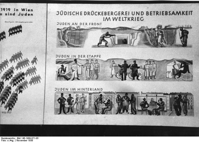 Ab 12. November im Reichstag zu Berlin: Die Ausstellung "Der Ewige Jude" wird nun nach München und Wien auch in der Reichshauptstadt gezeigt. 73 10/4. Eine eindrucksvolle Darstellung: Juden an der Front, in der Etappe und im Hinterland während des Weltgrieges. 8.11.38 [Herausgabedatum]